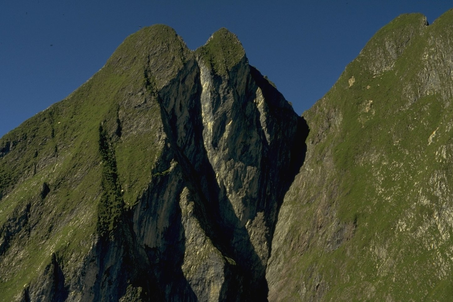 Höfats-Nordwand von kleiner Hoefats